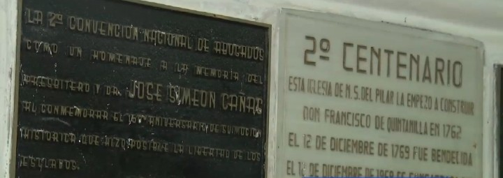 Tumba De Jose Simeon Cañas en la Iglesia de El Pilar, de San Vicente